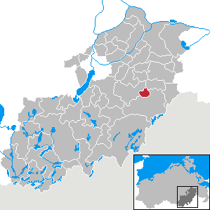 Petersdorf in Mecklenburg-Vorpommern, Landkreis Mecklenburg-Strelitz